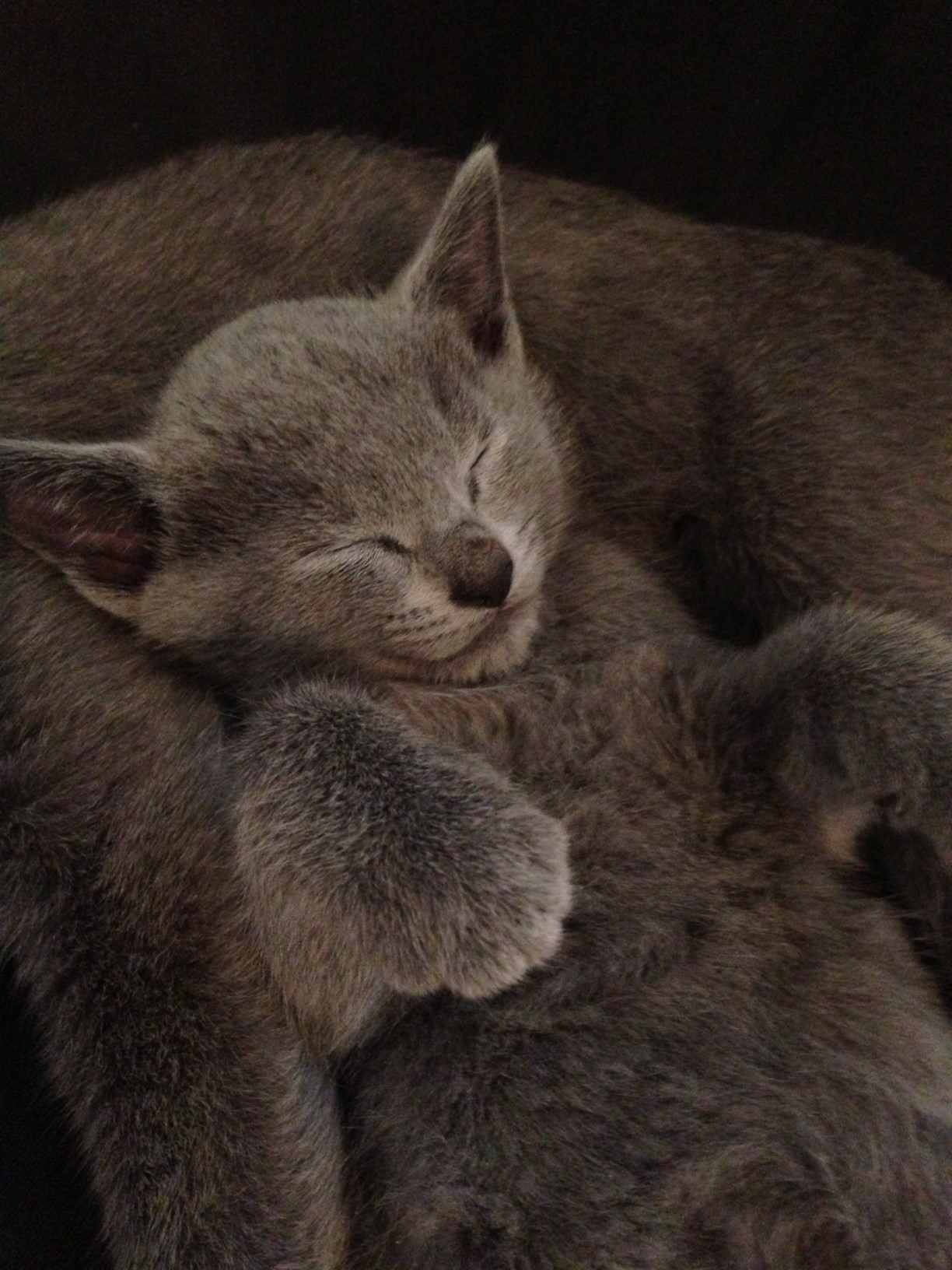 Russisch Blau Kitten beim Relaxen